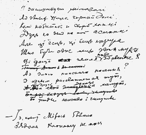 Аўтограф Новай зямлі